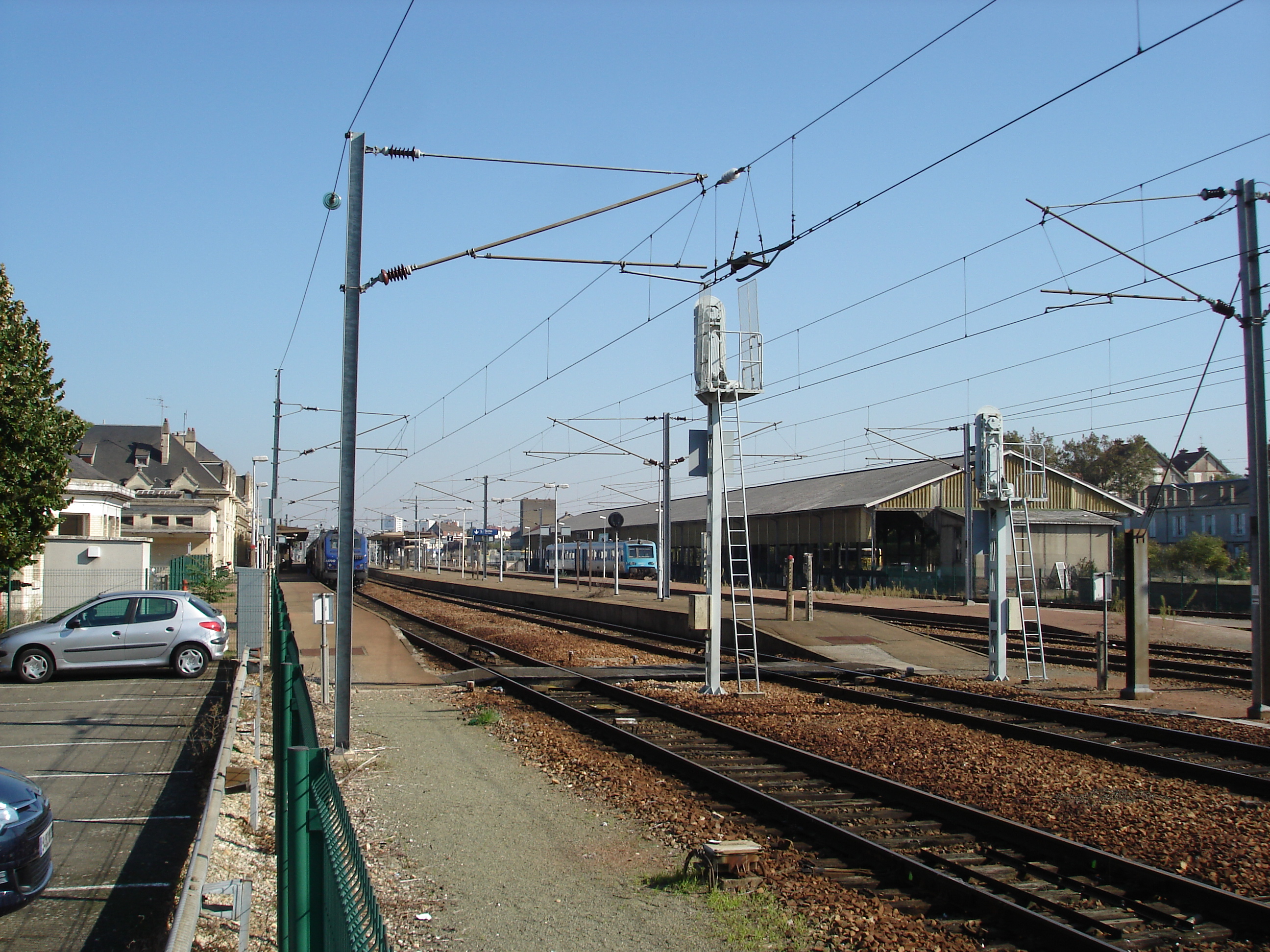 Gare de Dreux (28) : Vue générale de la gare, depuis le parking.